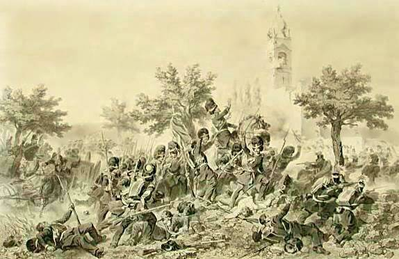 Battaglia di Santa Lucia del 6 maggio 1848